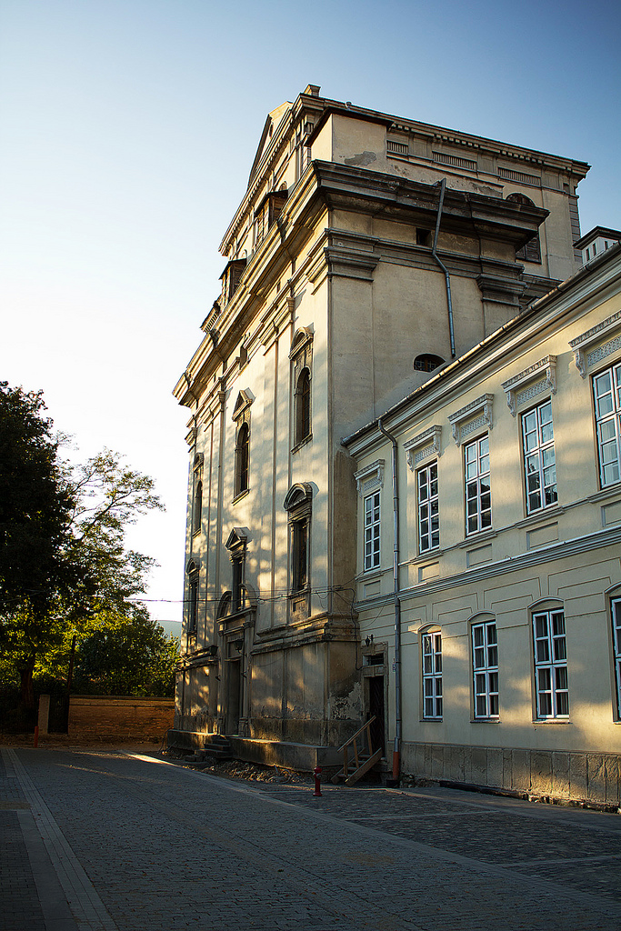 Fosta mănăstire a trinitarienilor, azi Biblioteca documentară Batthyaneum, interiorul Cetății Alba Carolina, Alba Iulia